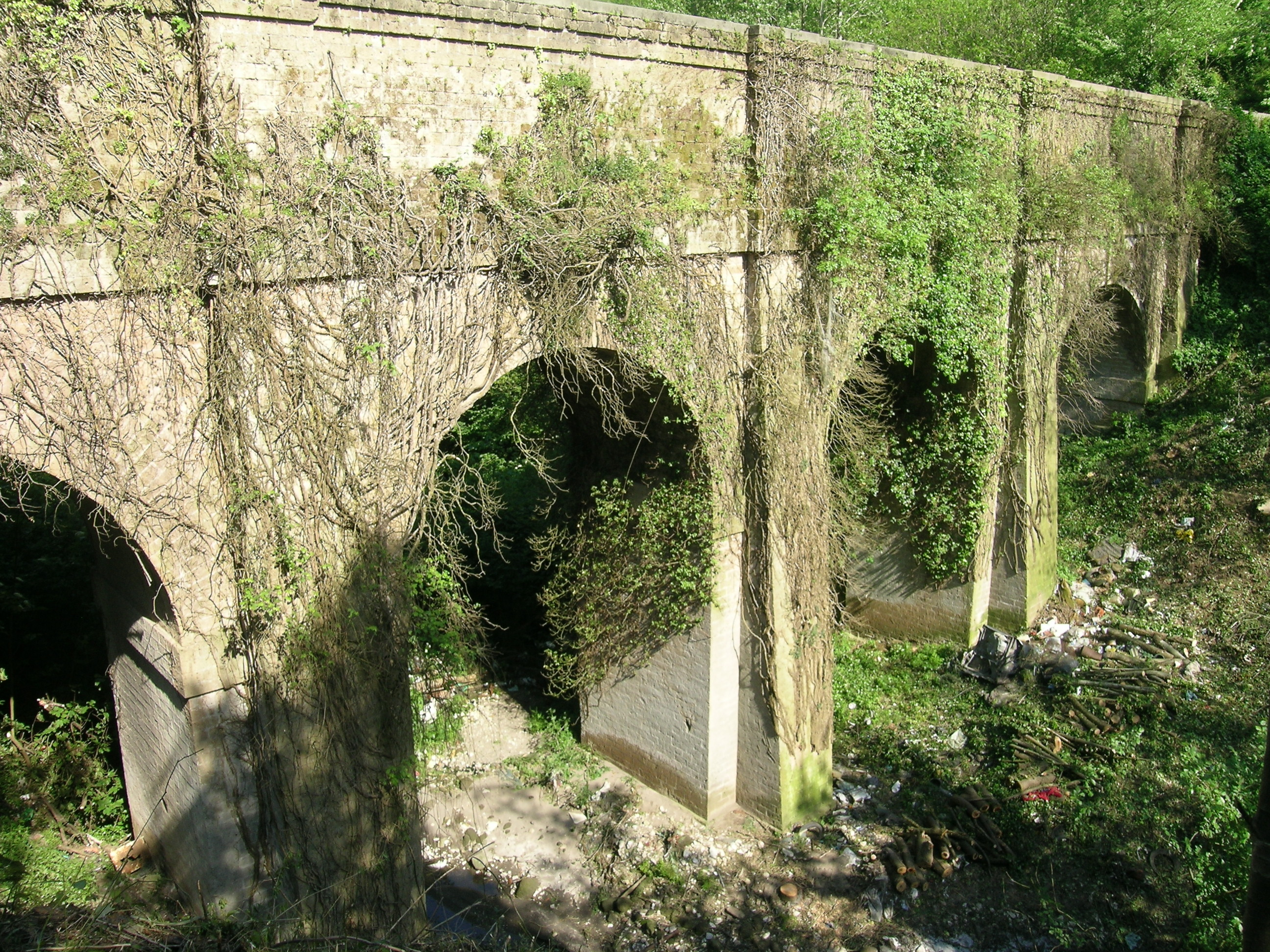 Il Ponte della Valle di Durazzano visto dal versante del Monte Longano